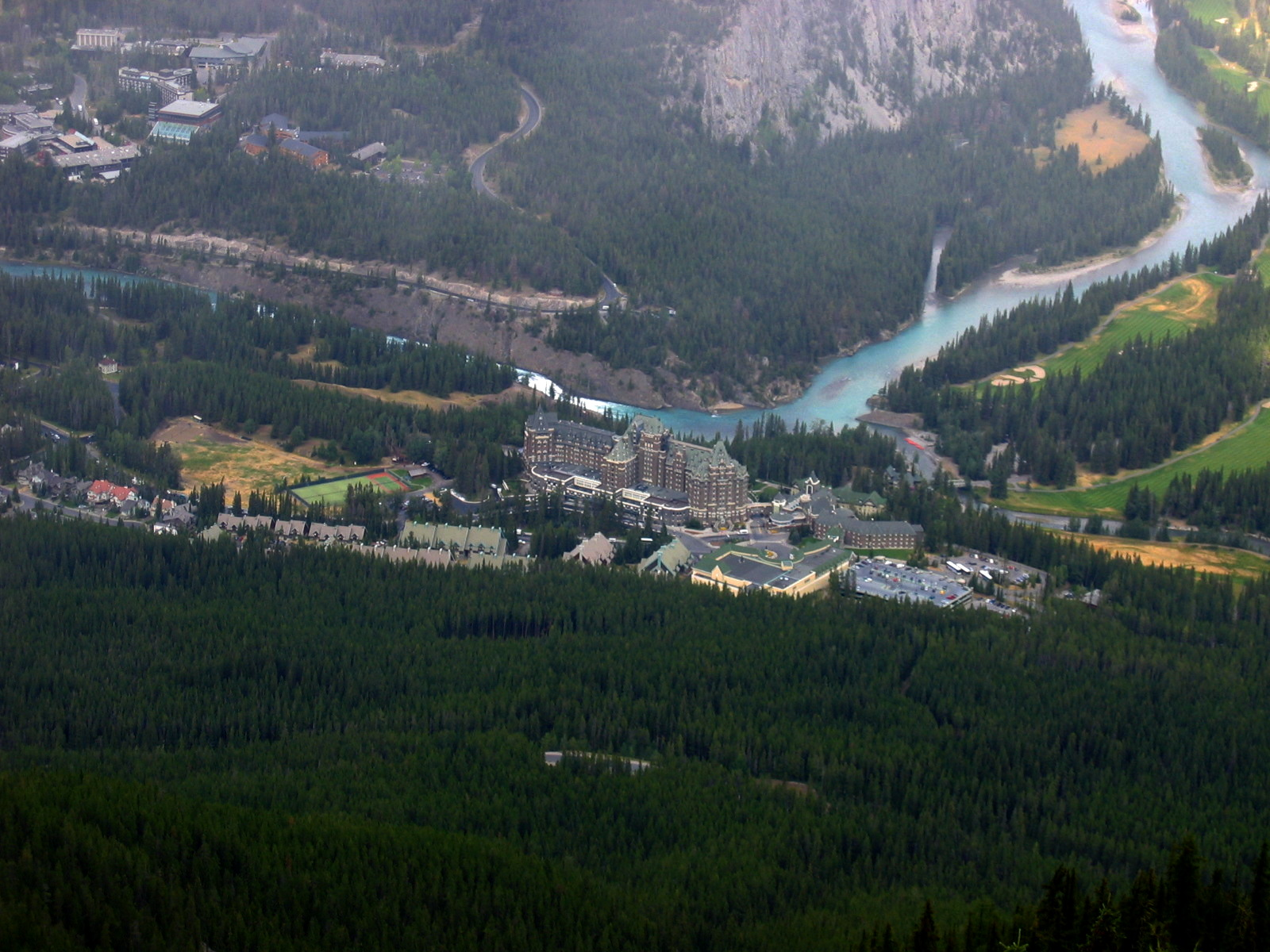 Sulphor Montain-Ausblick, Banff National Park, Alberta